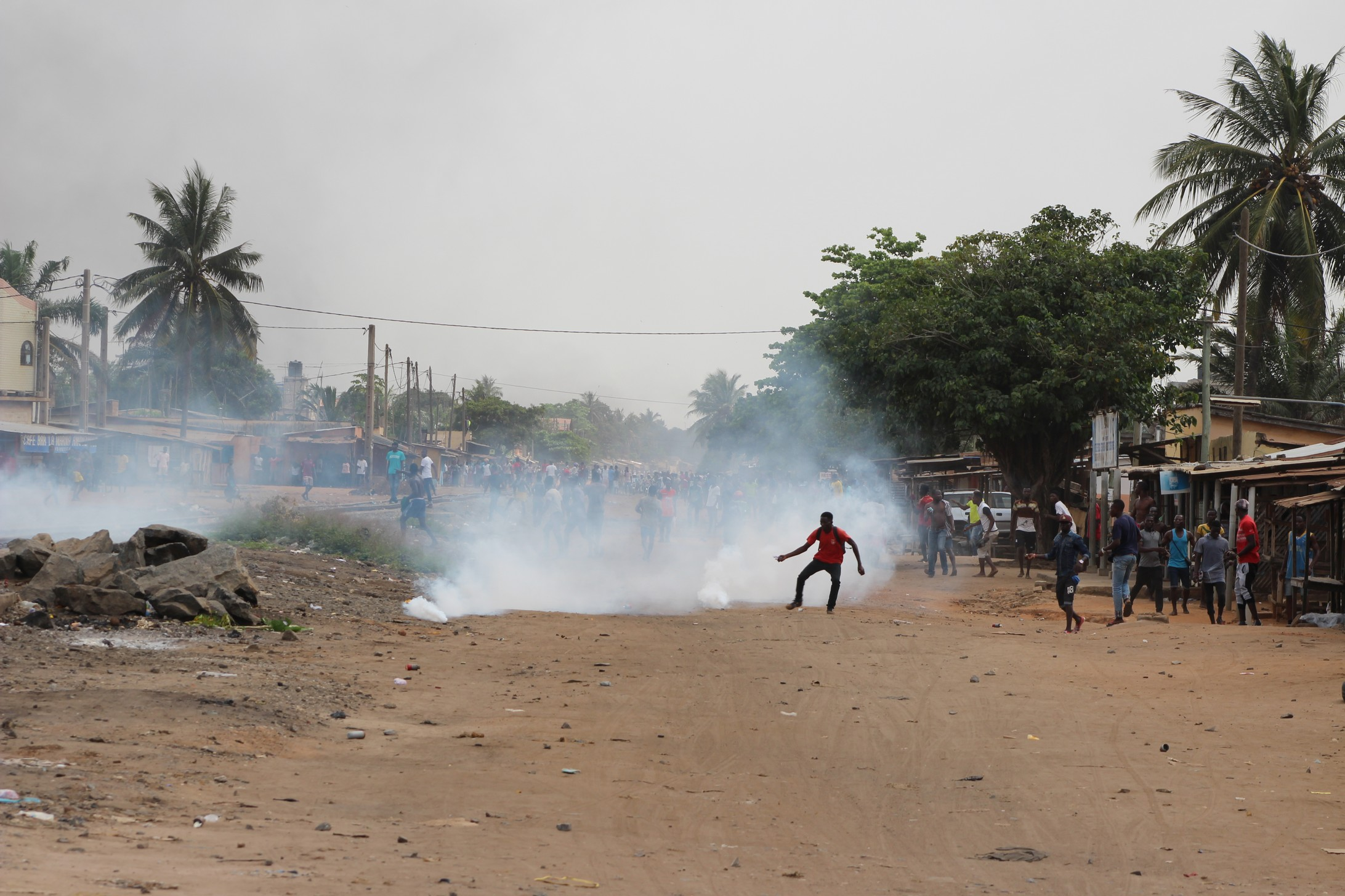 Des manifestations dans les rues de Lomé, au Togo, le 18 octobre 2017. (VOA/Kayi Lawson)